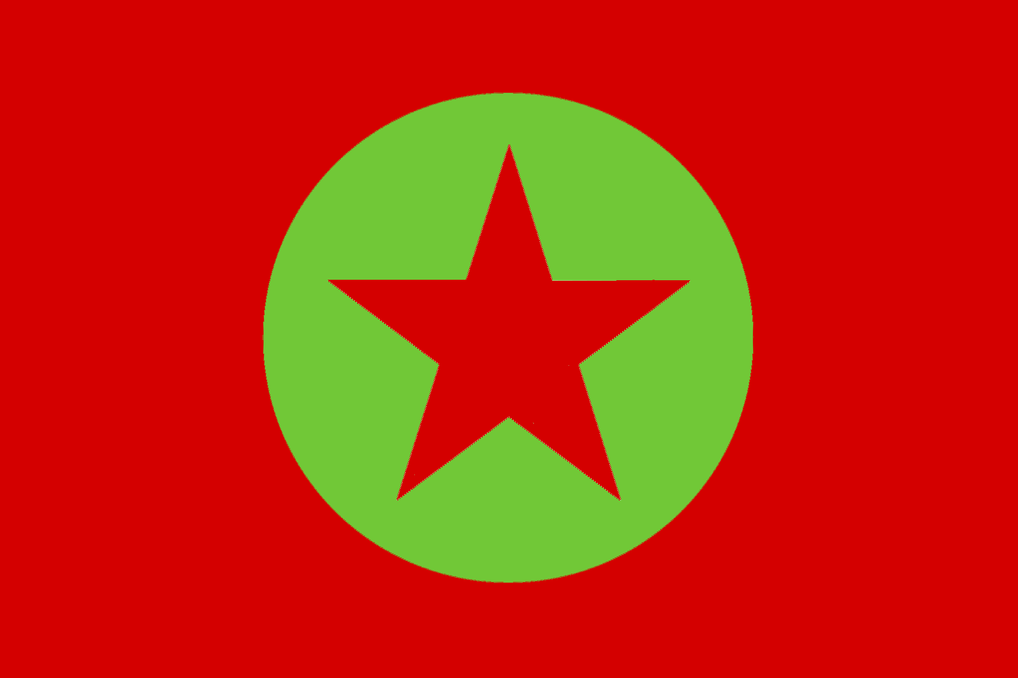 Bandera del MAPU Obrero Campesino